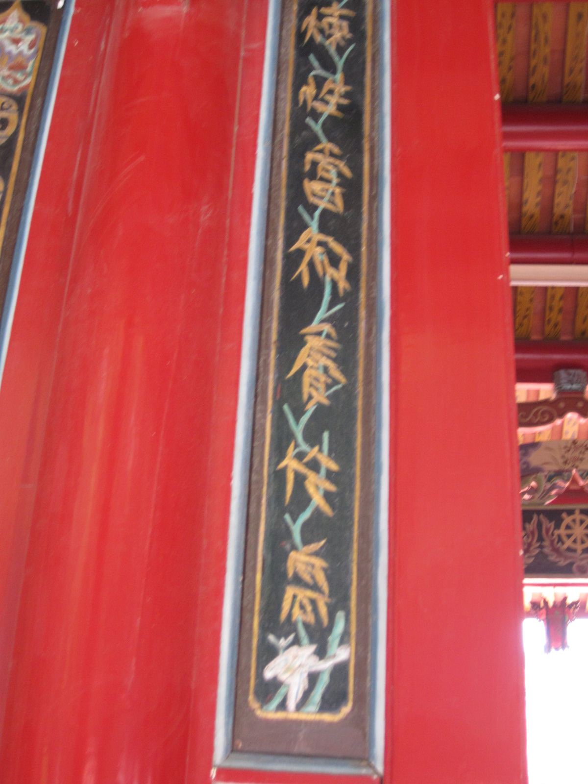 林朝英竹葉體楹聯，現存於臺南開元寺三川門上。